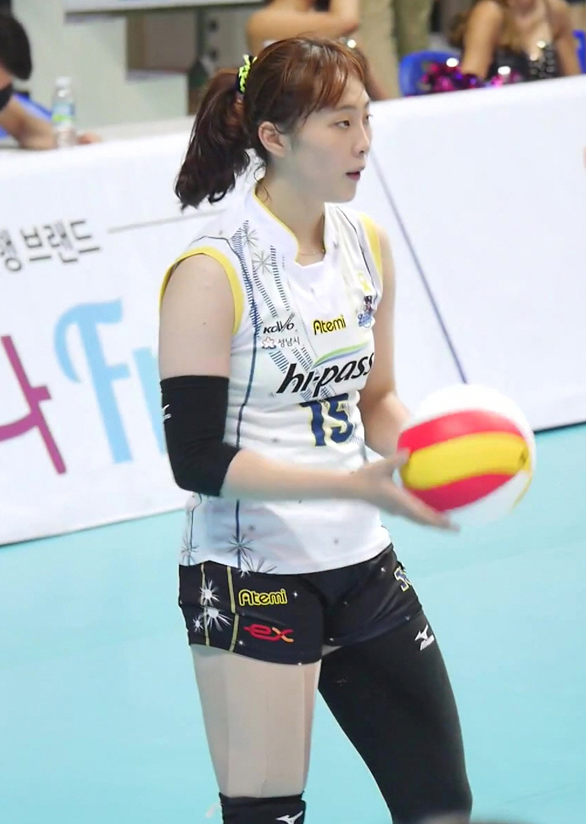 (직캠) 140721 수비요정 밍키 0m0s